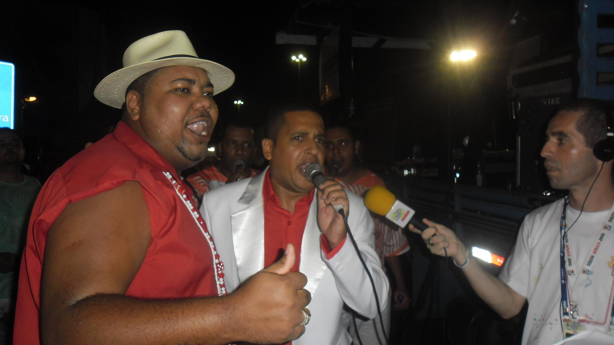 GRES Unidos de Bangu